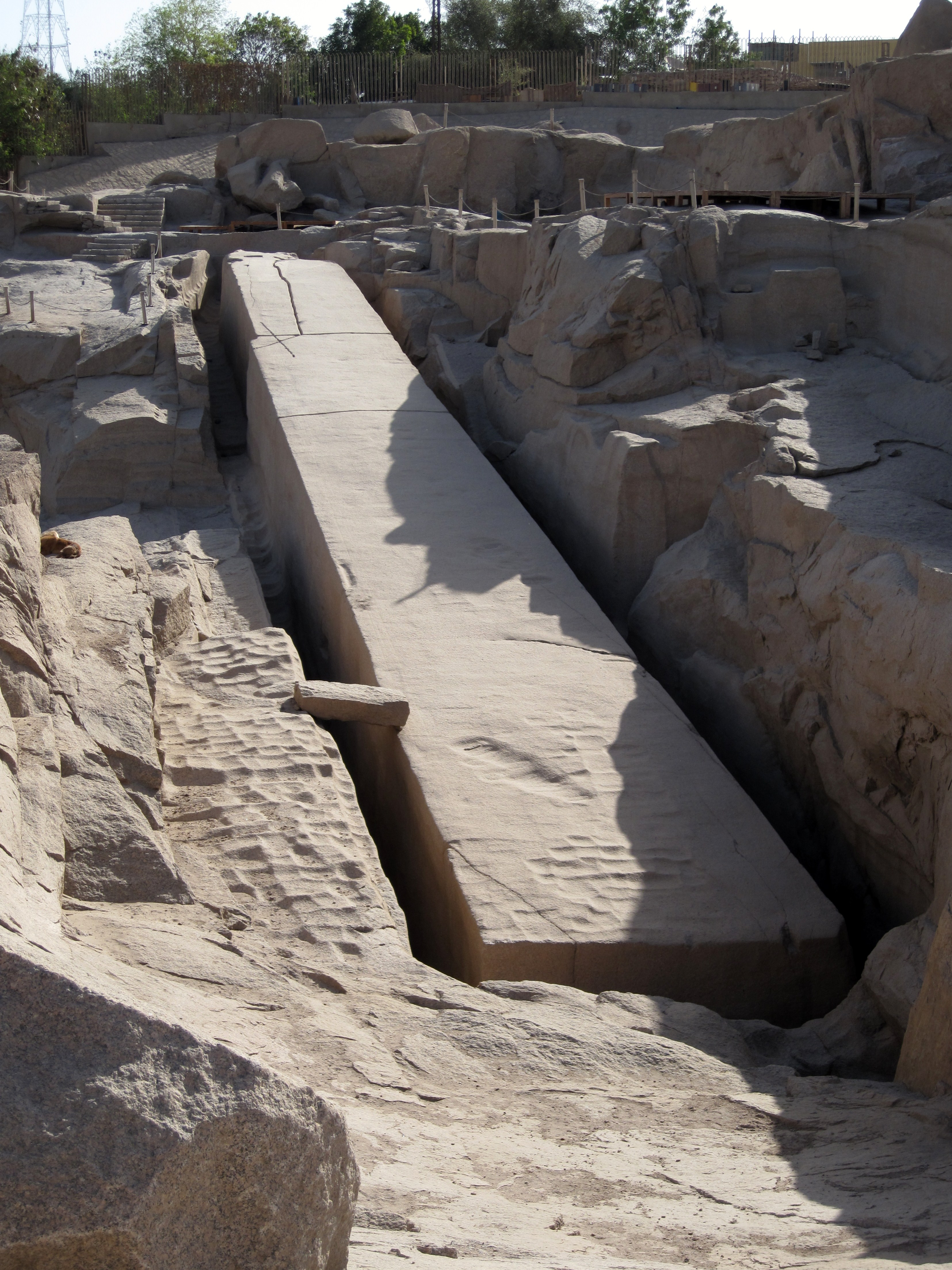 Unvollendeter Obelisk im Steinbruch von Assuan, Ägypten